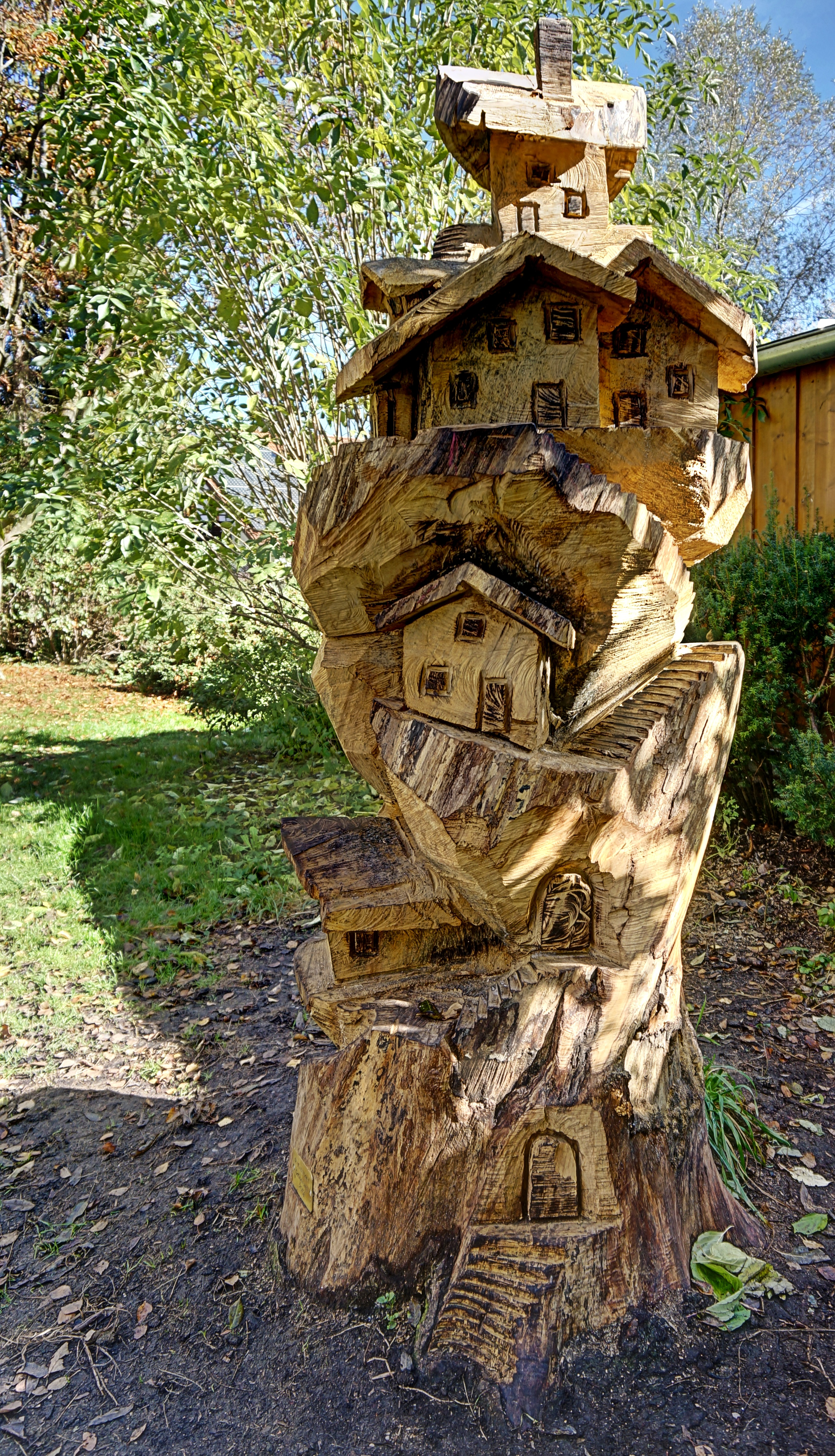 Das "Feenschlösschen" am Gröbenzeller Gröbenbach an der Gröbenbachstraße, kurz vor der Gröbenbachschule. Gefertigt von dem Werkzeugmacher Richard Litzinger im Herbst 2013. Die Skulptur entstand mit Hilfe einer Kettensäge aus einem Kastanienbaum, dessen oberer Teil aufgrund gravierender Schäden gefällt werden musste.